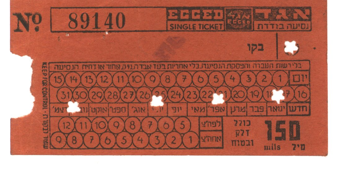 כרטיס לנסיעה בקו אגד חיפה - עפולה משנת 1945.